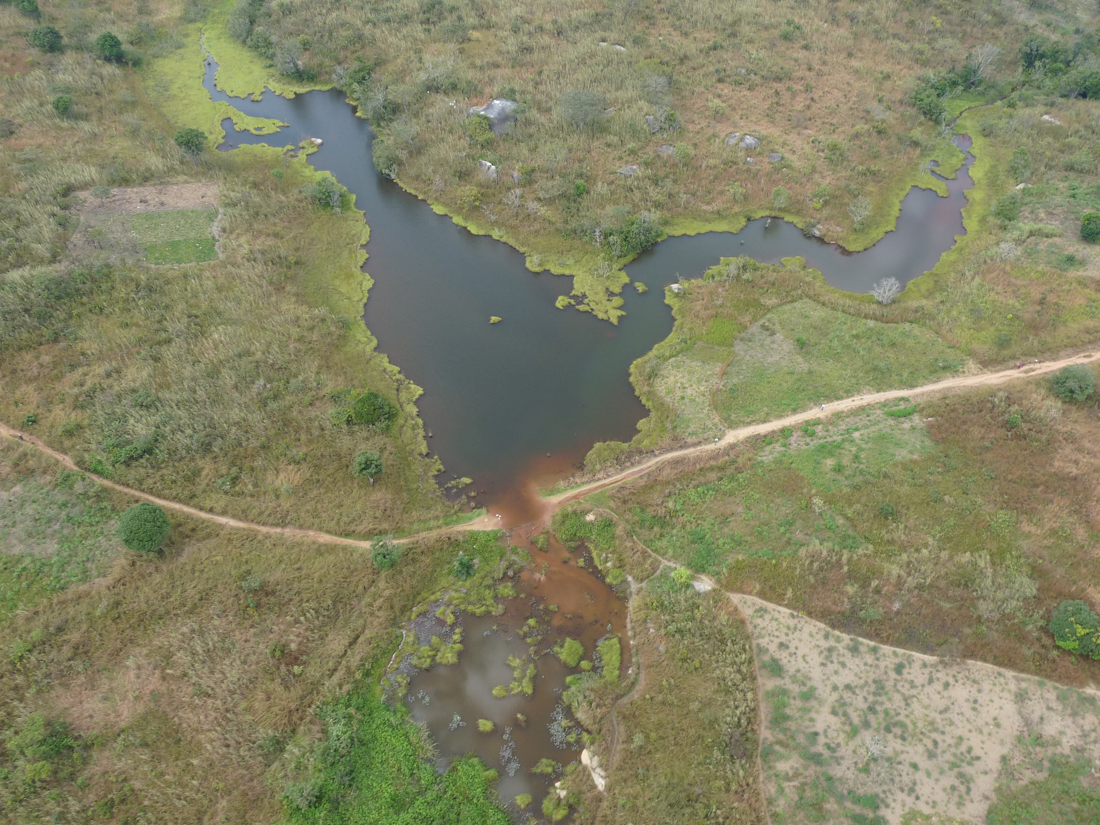 La préfecture de la Nana-Mambéré (Centrafrique) vue du ciel.